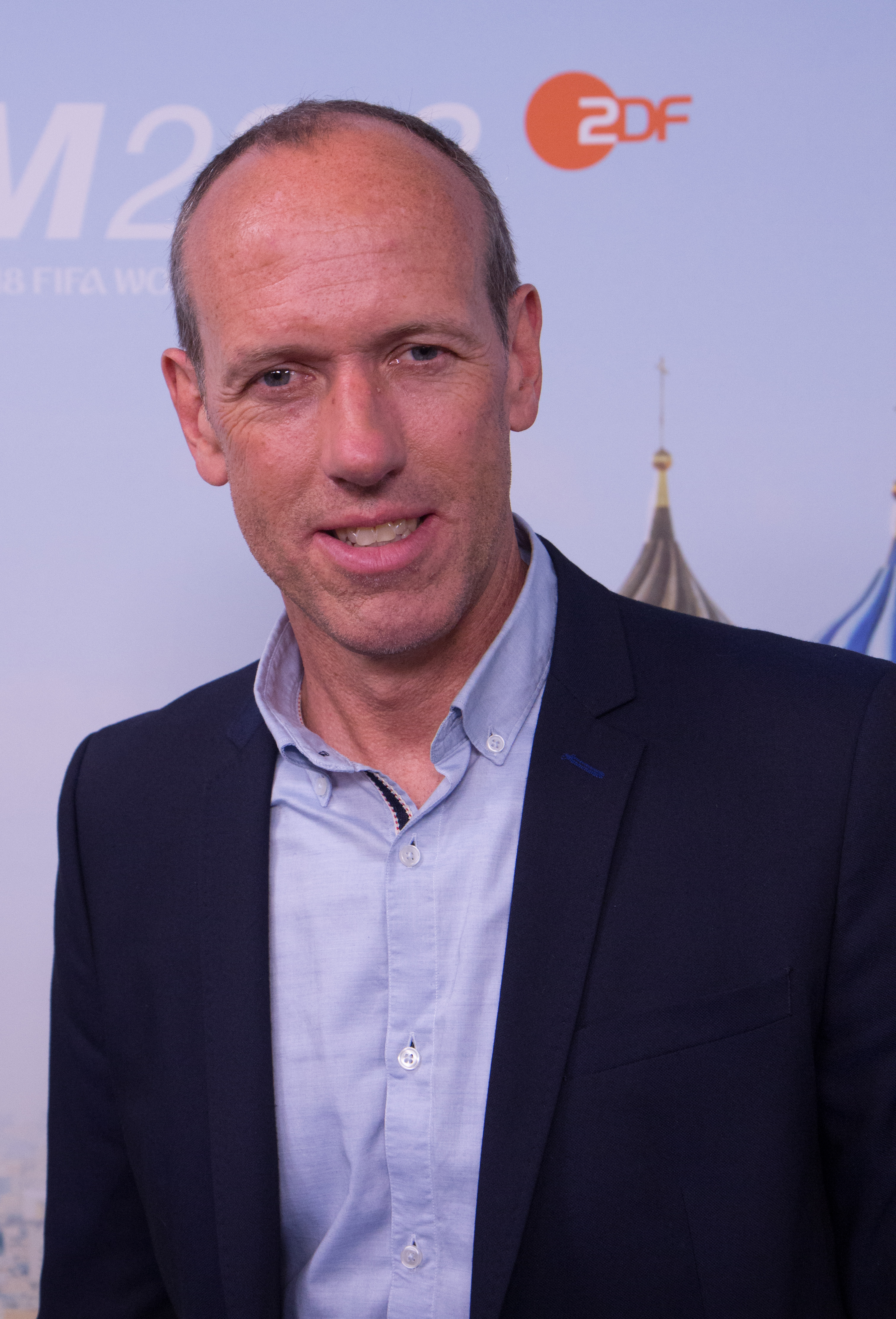 FIFA WM 2018 Pressevorstellung von ARD und ZDF in Hamburg: Martin Schneider